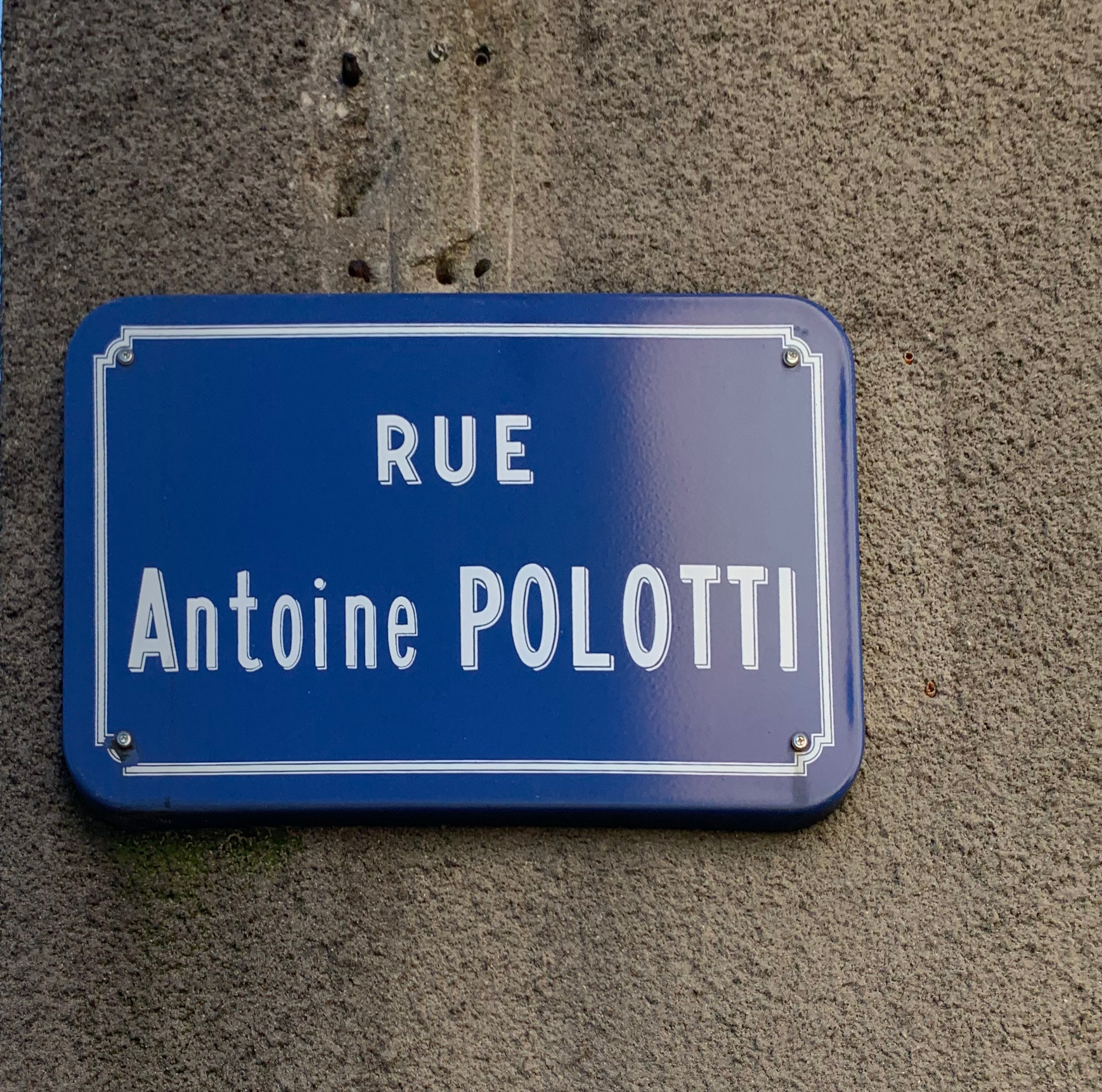 Rue Antoine Polotti (Grenoble) - panneau de rue.